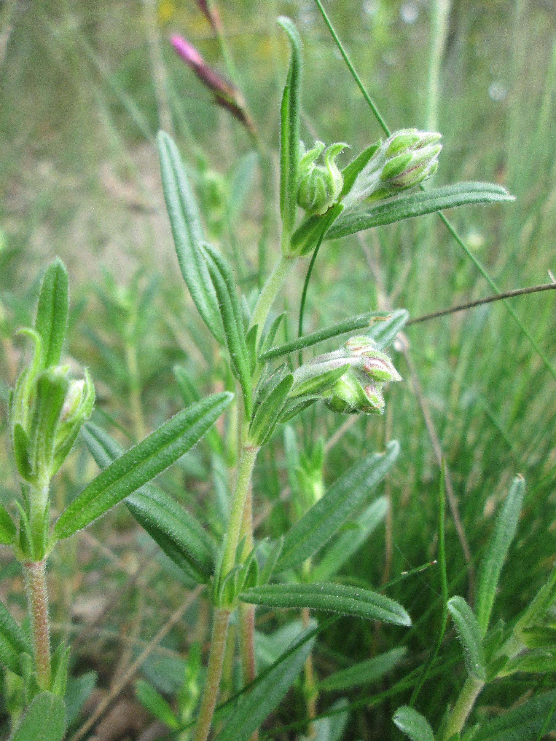 Nickendes Leimkraut (Silene nutans) am Dreieichenbuckel im Naturschutzgebiet „Oftersheimer Dünen“